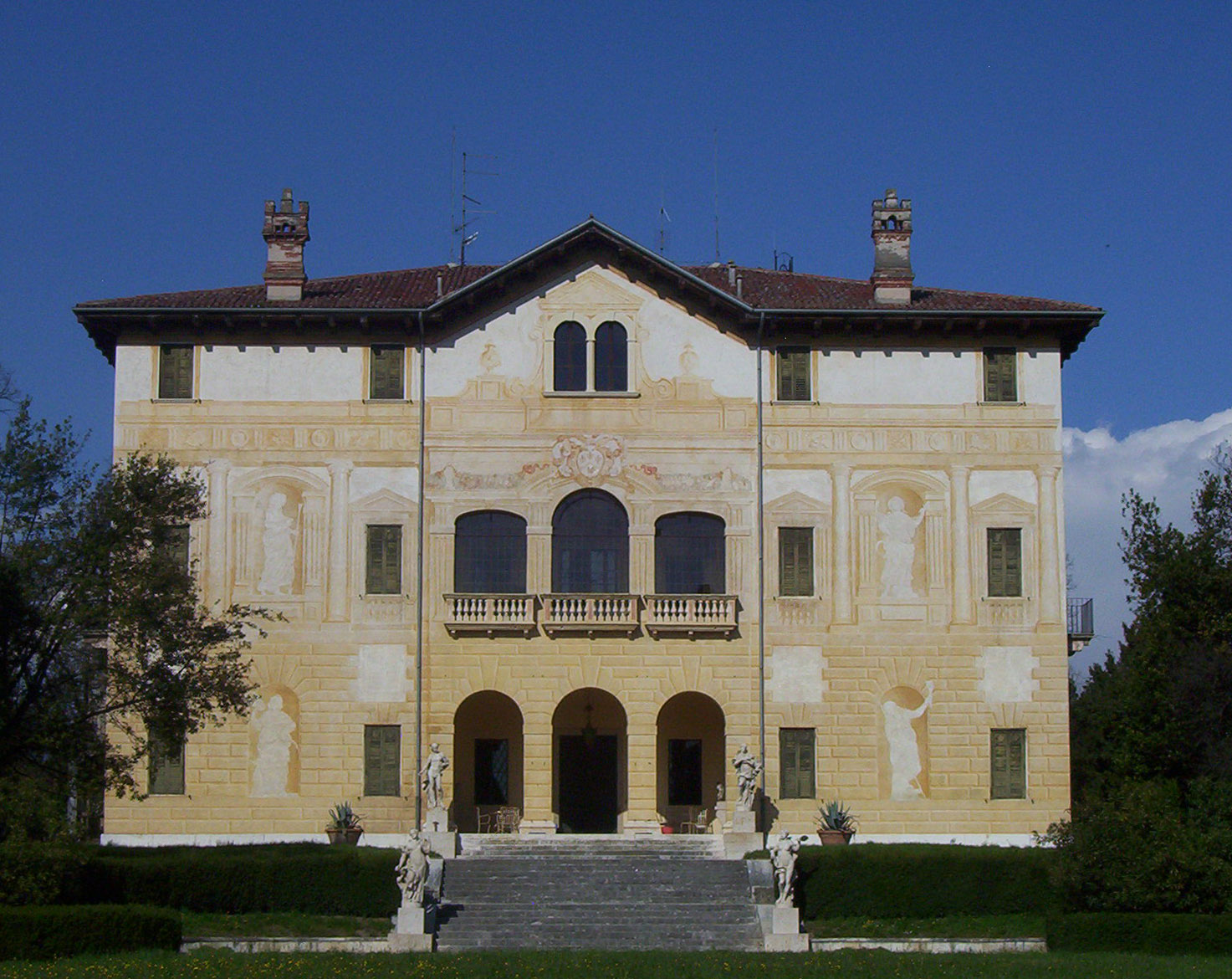 La facciata di villa Pullè Galtarossa di San Pietro in Cariano